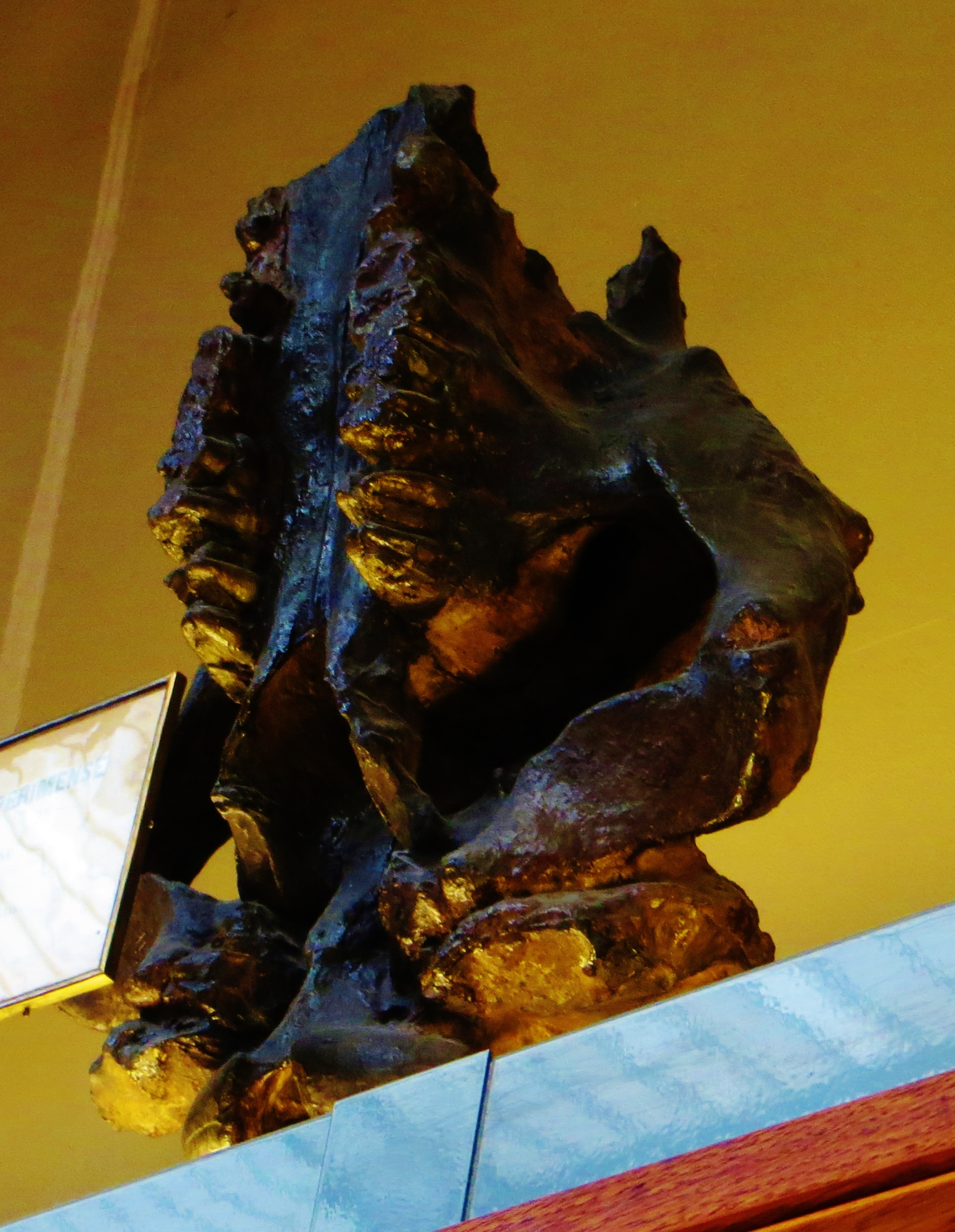 Fossil of Bramatherium, an extinct mammal- Took the photo at Museum Histoire Naturelle, Paris